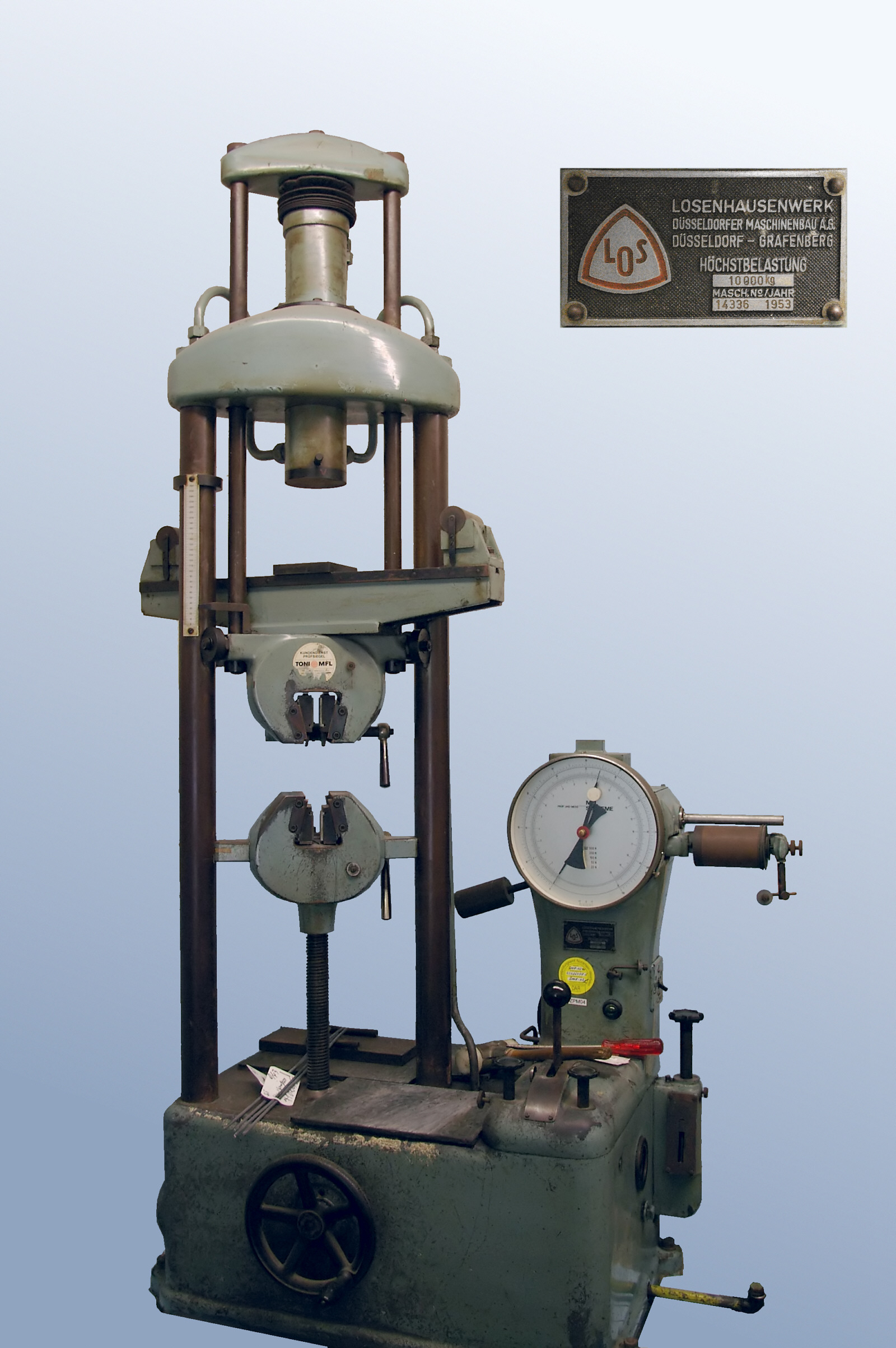 Prüfmaschine zur Bestimmung von Zug- und Stauchfestigkeit von Stahldrähten, Losenhausenwerk Düsseldorf, 1953. Typenschild per Bildbearbeitung einkopiert. Aufnahme mit frdl. Genehmigung der Fa. Vom Hofe Kaltstauchdraht GmbH, Altena